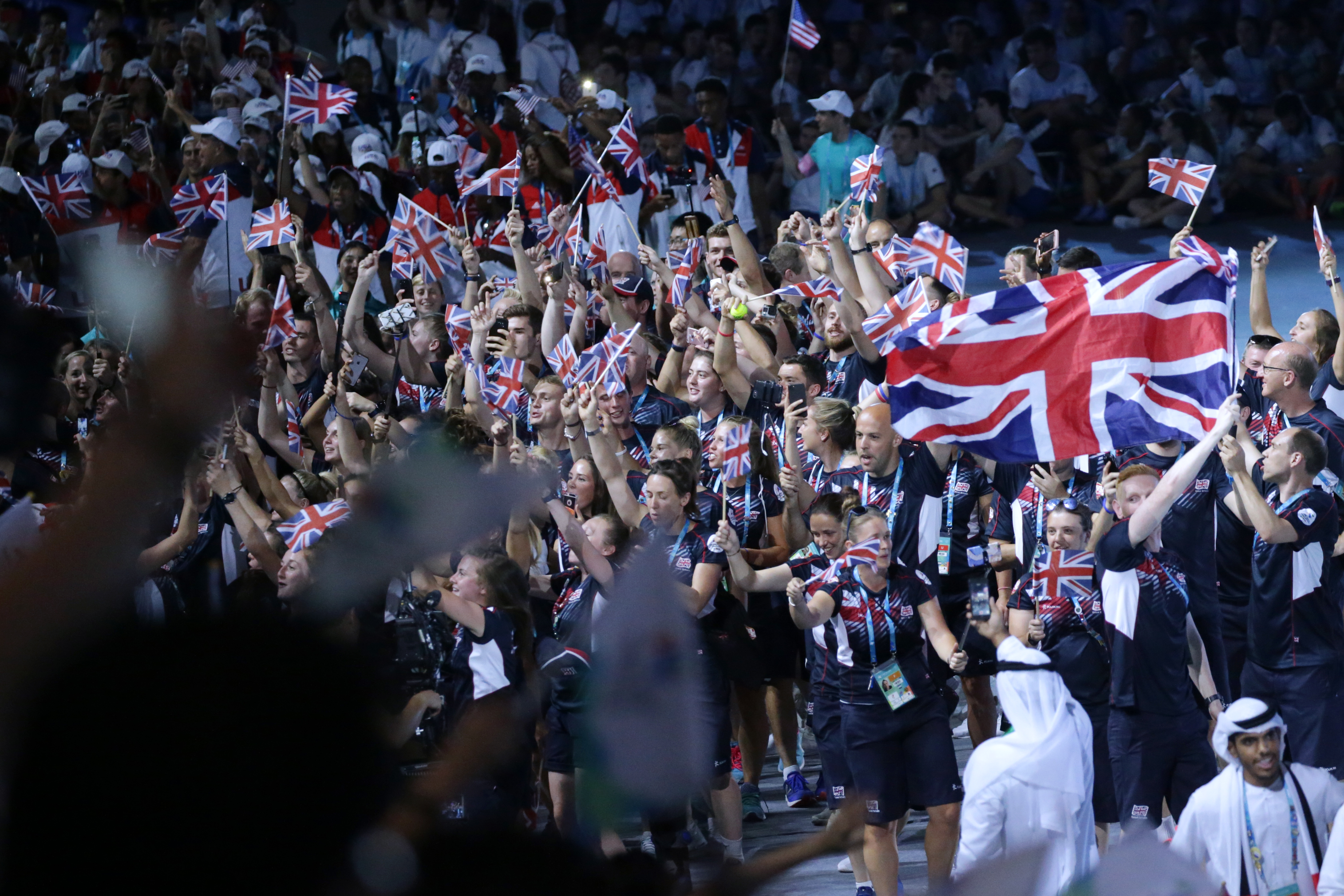 08.19 2017年世界大學運動會開幕典禮，各國選手代表與會旗進場